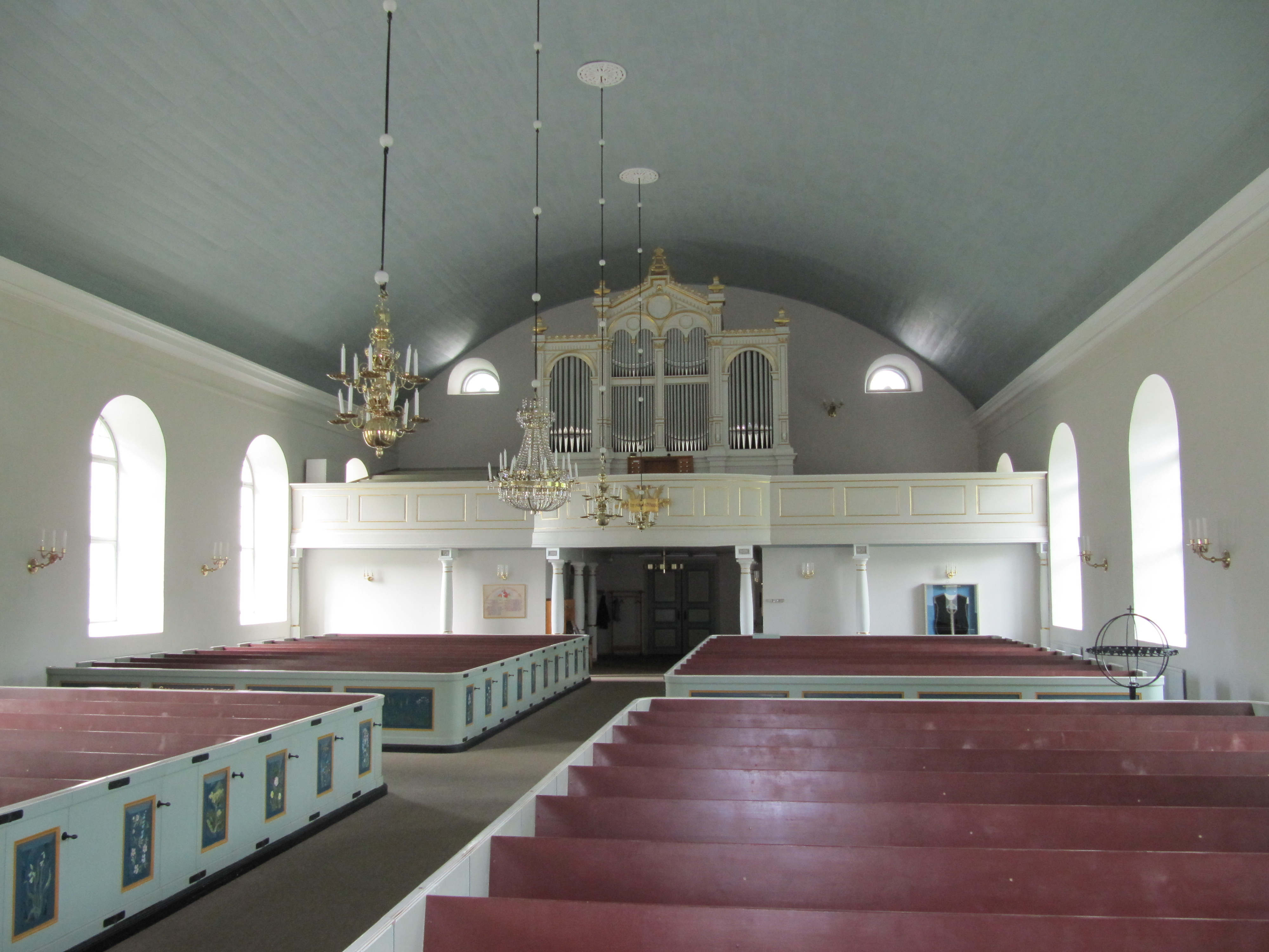 Vy mot orgelläktare i Hjälmseryds kyrka